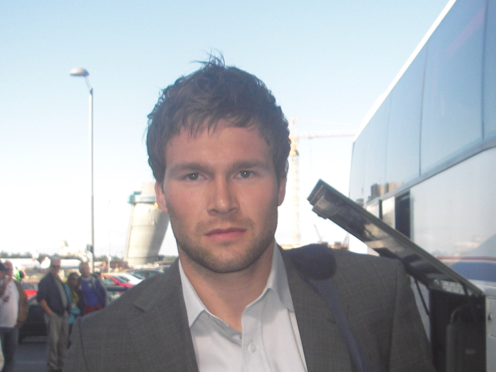 Håkon Opdal, SK Brann player.